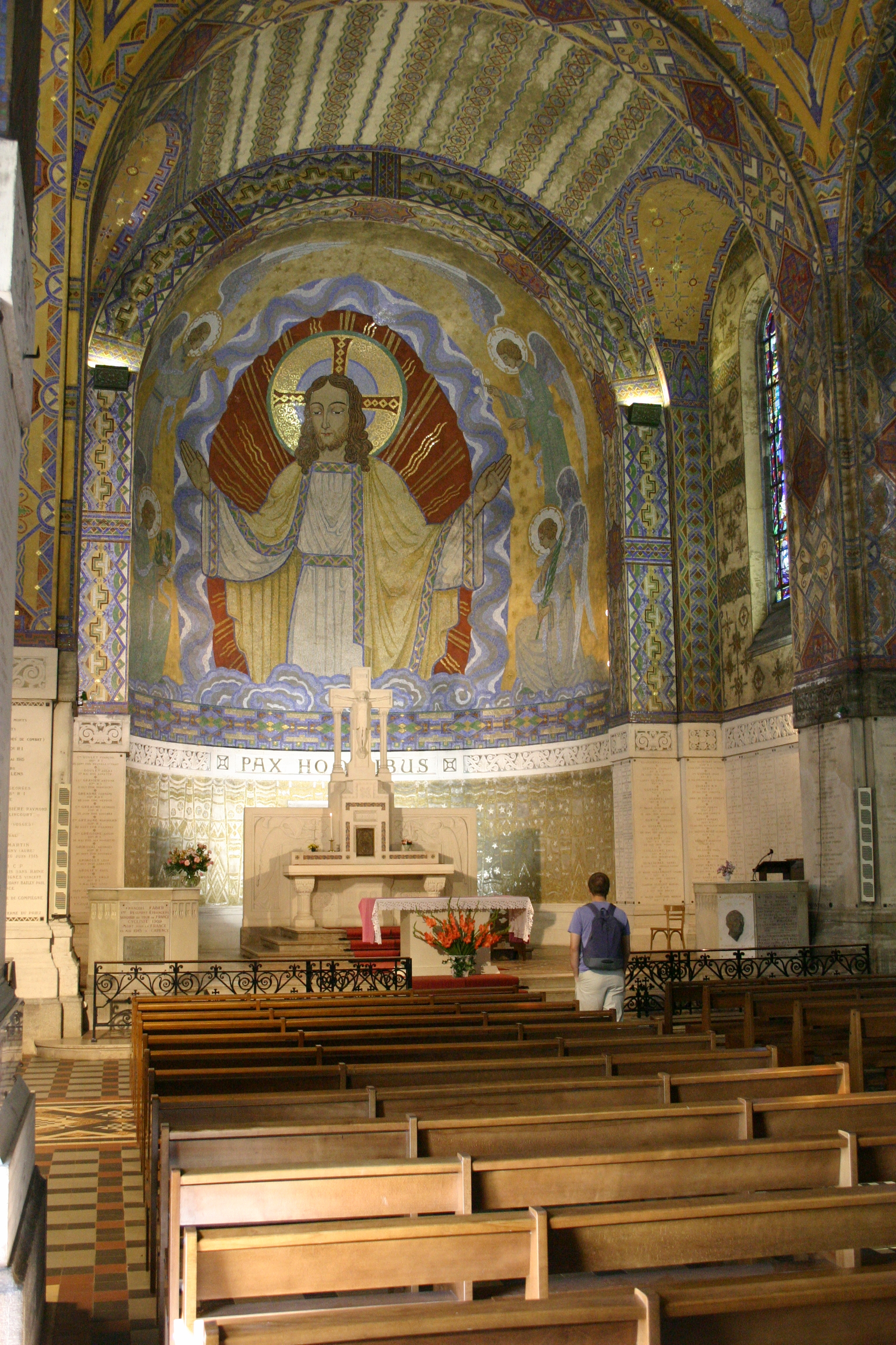 L'intérieur de la basilique de Notre Dame de Lorette